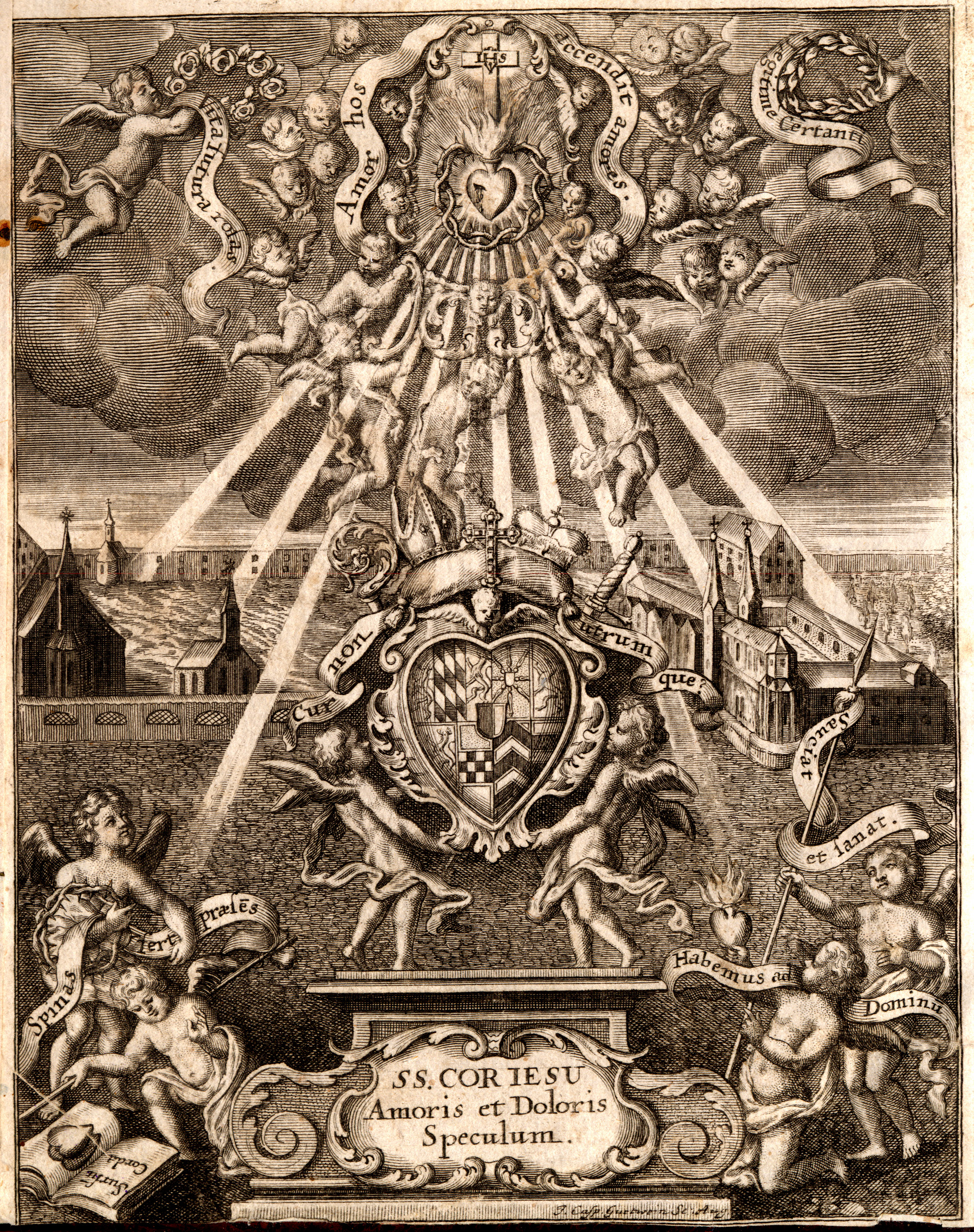 Frontispiz aus u.g. Werk. Abgebildet ist das von einem Strahlenkranz umgebene Herz Jesu (SS. COR IESU Amoris et Doloris Speculum. Heiligstes Herz Jesu, Spiegel der Liebe und des Schmerzes), von Engeln getragen. Im Hintergrund der Augsburger Dom.